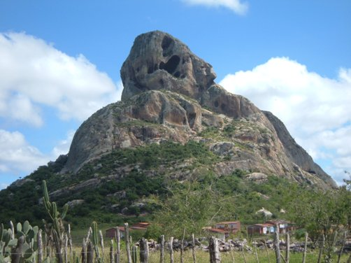 Serra do Leão